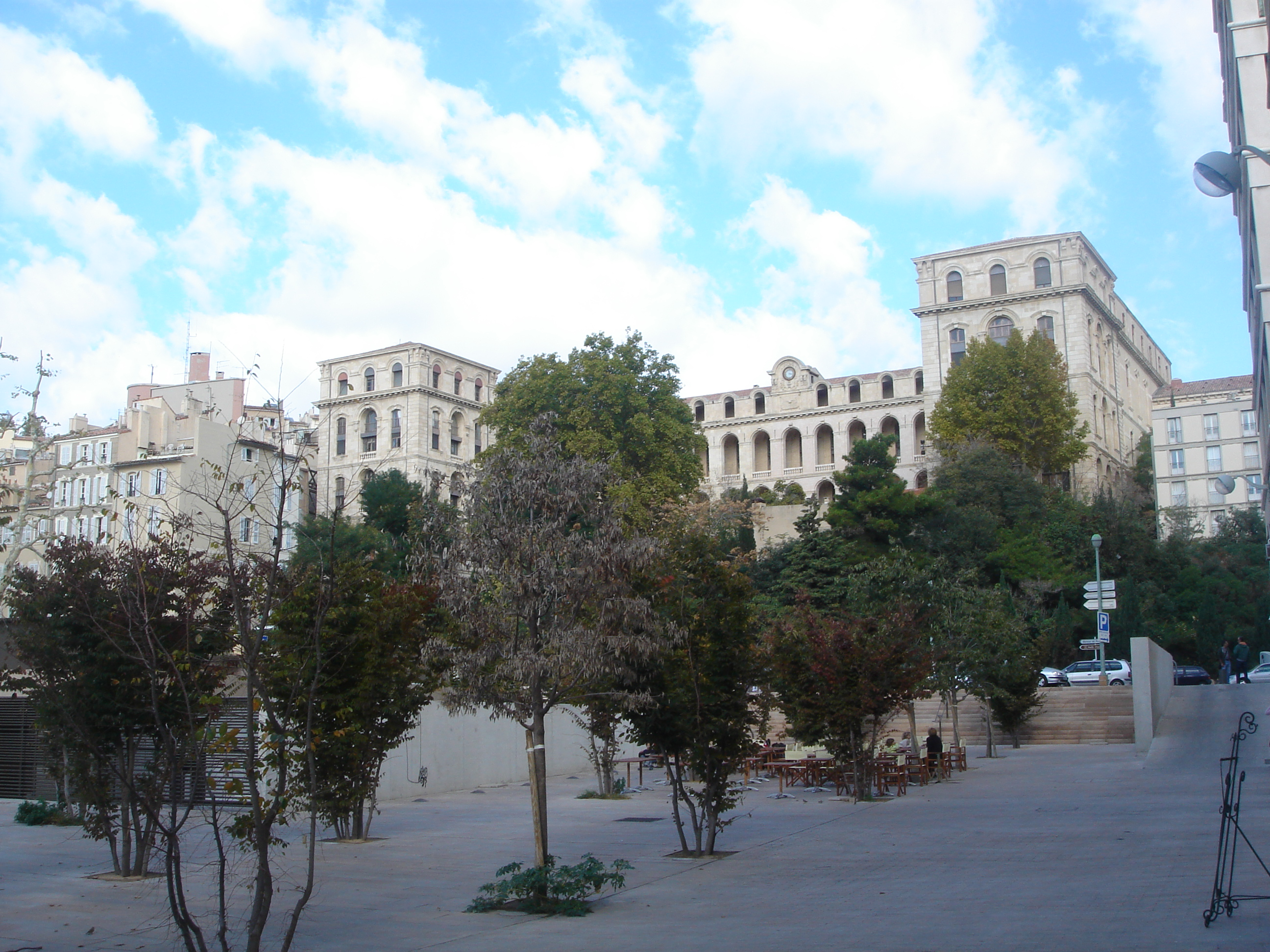 L'Hôtel-Dieu de Marseille vu de l'espace Bargemon.